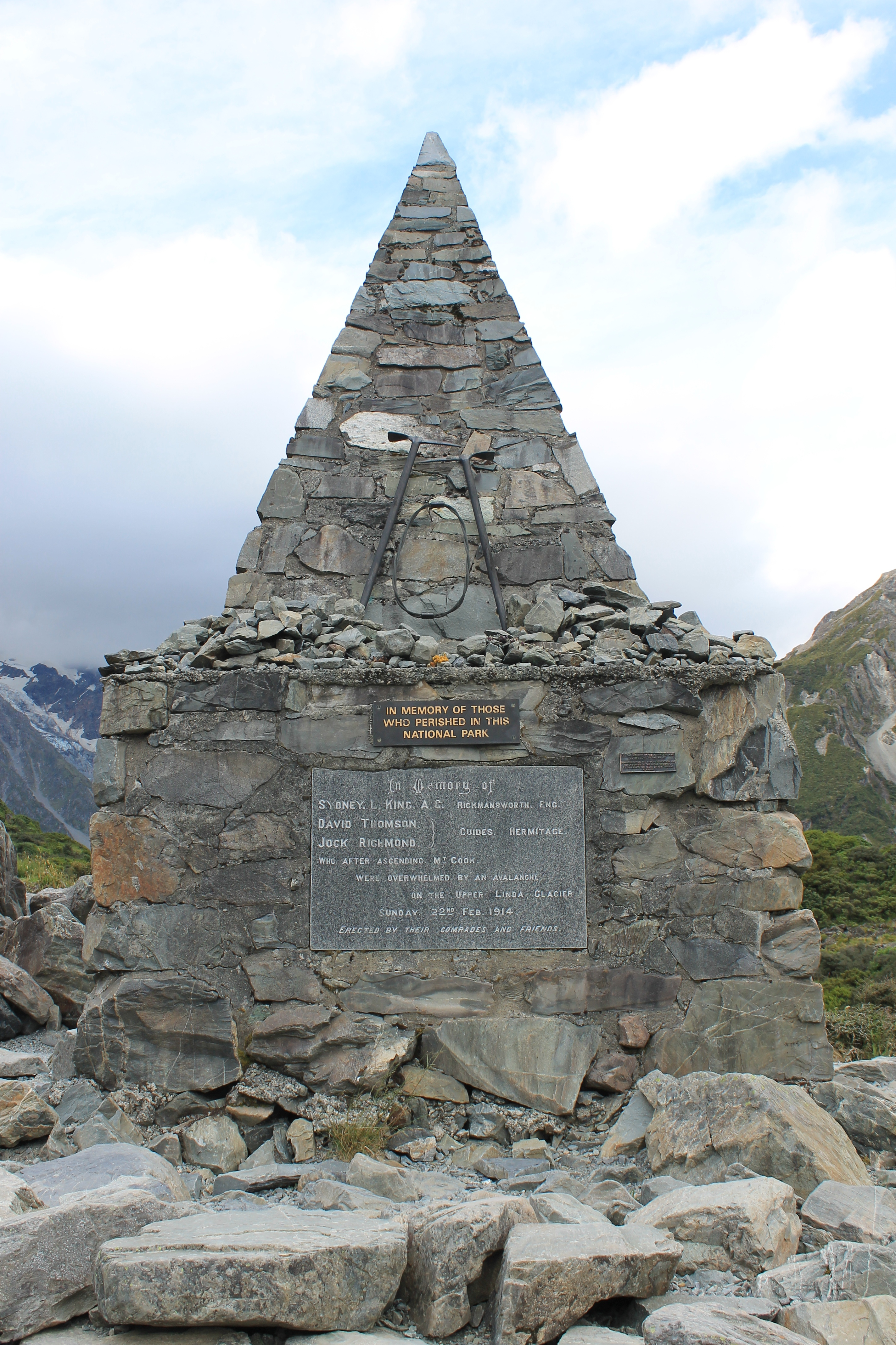 Memorial